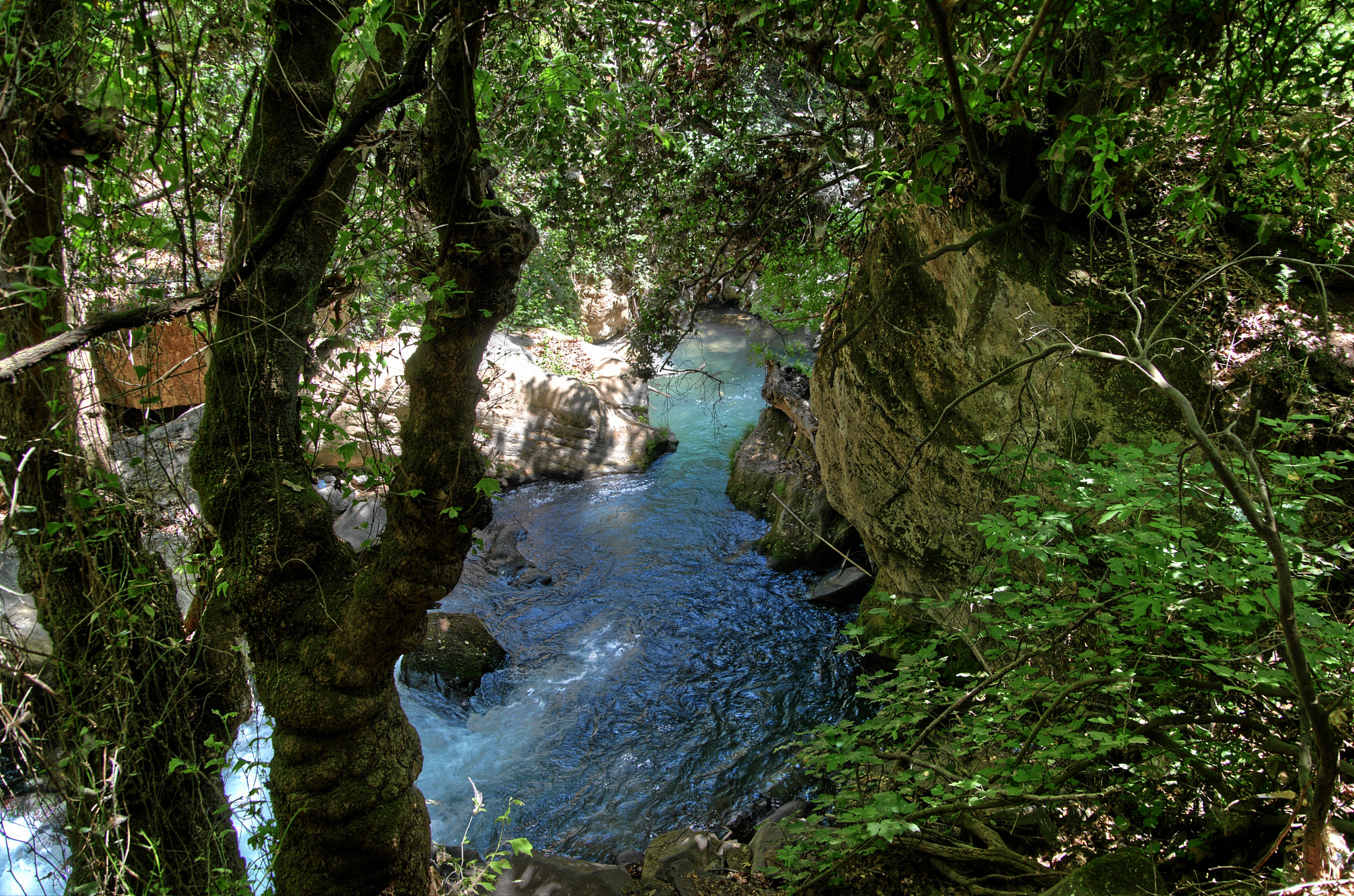 Banias Falls / Nahal Hermon